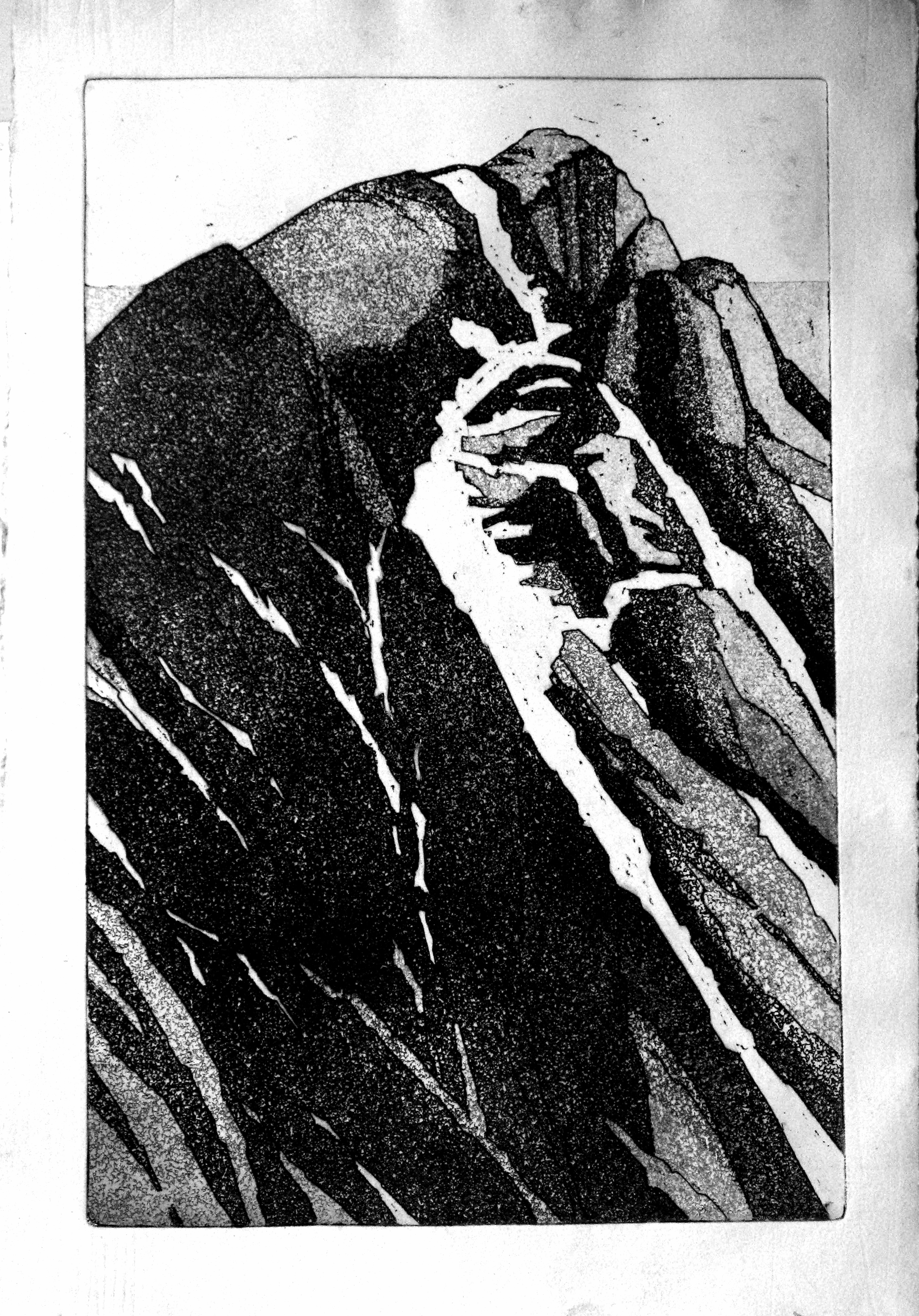 Fjell